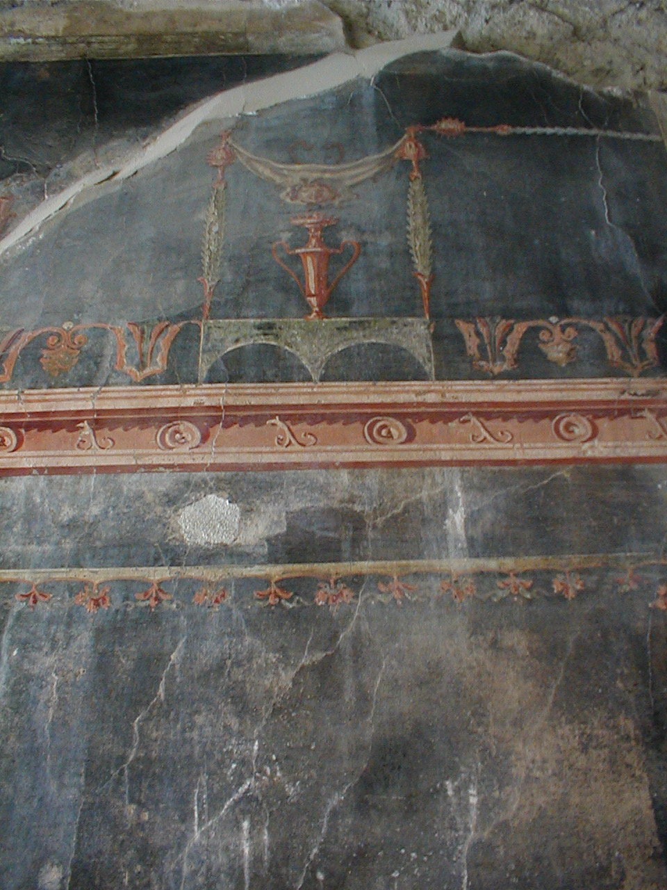 הבית עם הסלון השחור.